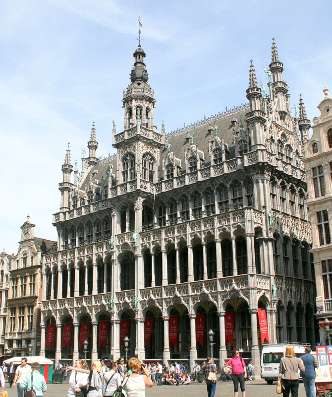 Bruksela, Muzeum Miejskie, d. Dom Króla